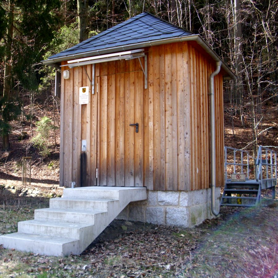 Pegelhaus Bärenfels am Pöbelbach Automatische Pegelseite